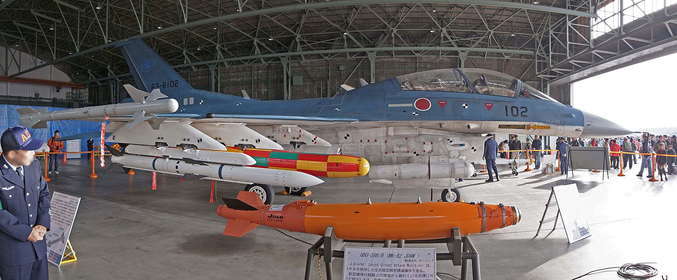 JASDF F-2 , 航空自衛隊 F-2